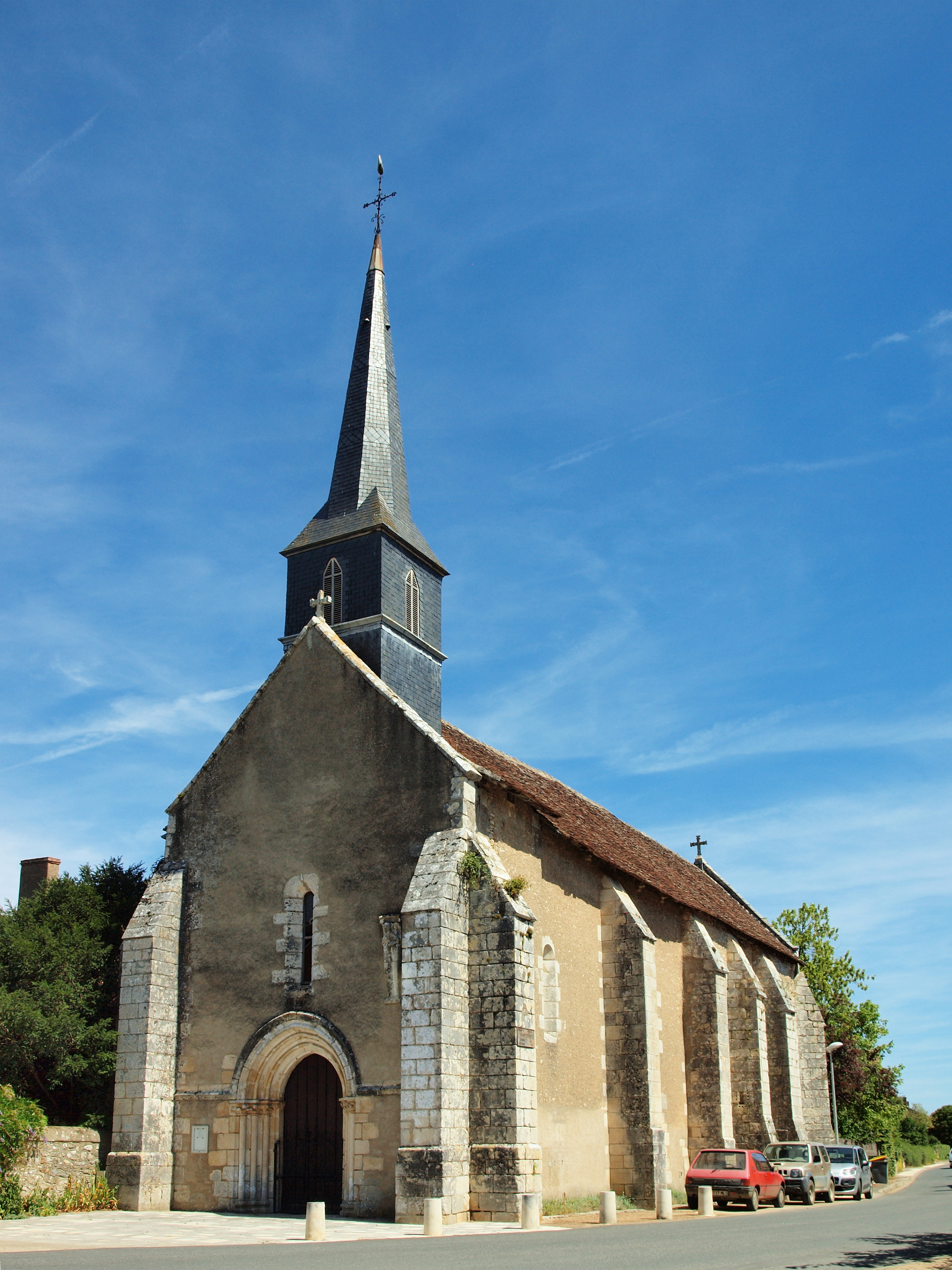 Église Saint-Léger de Mauvières (Indre, France)